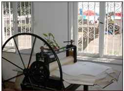 Снимка на графичната база, собственост на Дружеството на бургаските художници